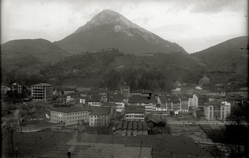 Título original: Vista general de la localidad de Arrasate-Mondragón (1/1) Localización: Mondragón (Guipúzcoa)